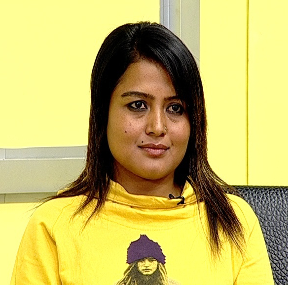 नेपाली: नेपाली नायिका